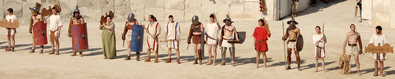 Présentation de l'équipe aux arènes de Nîmes